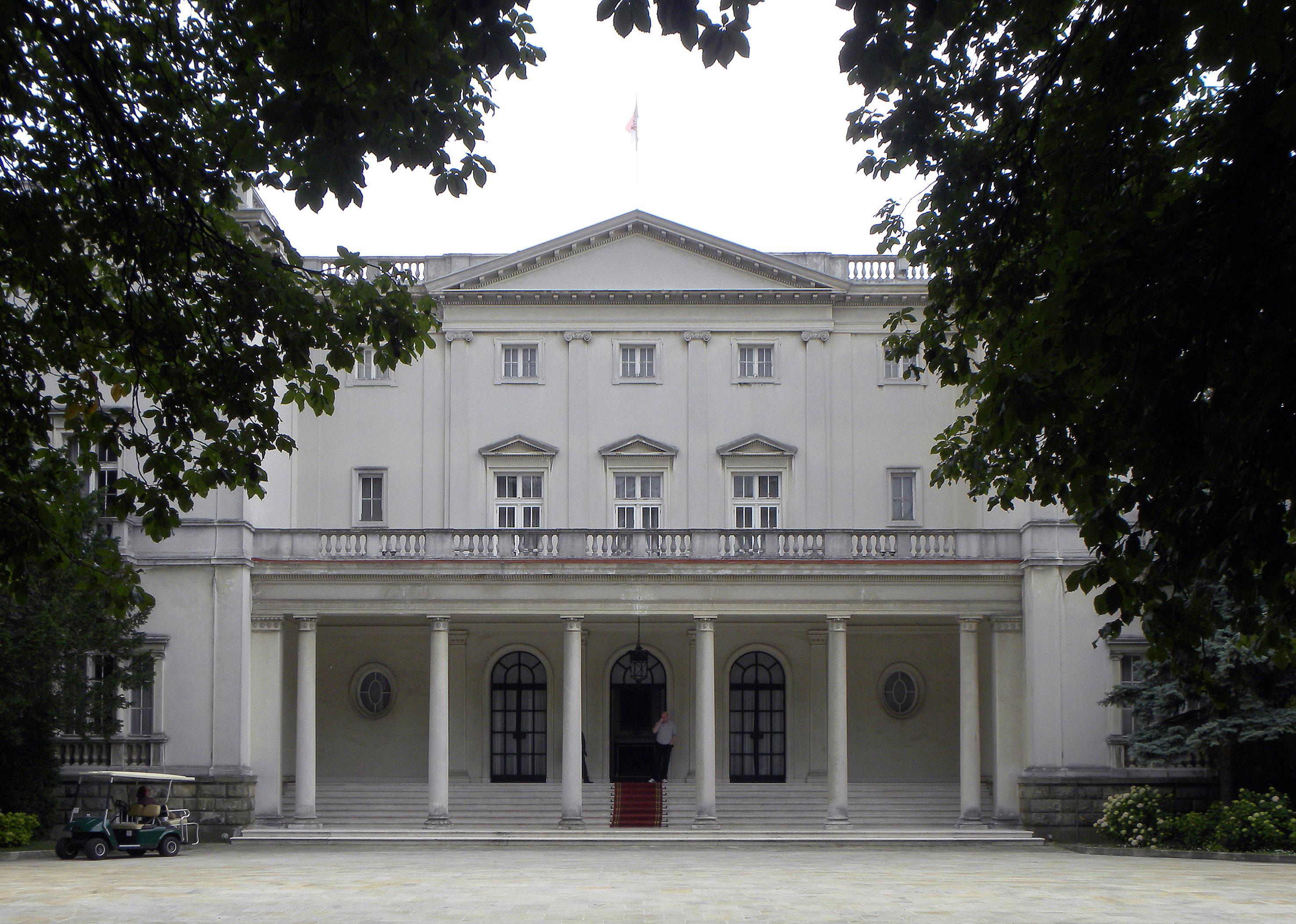 Beograd Beli dvor na Dedinju